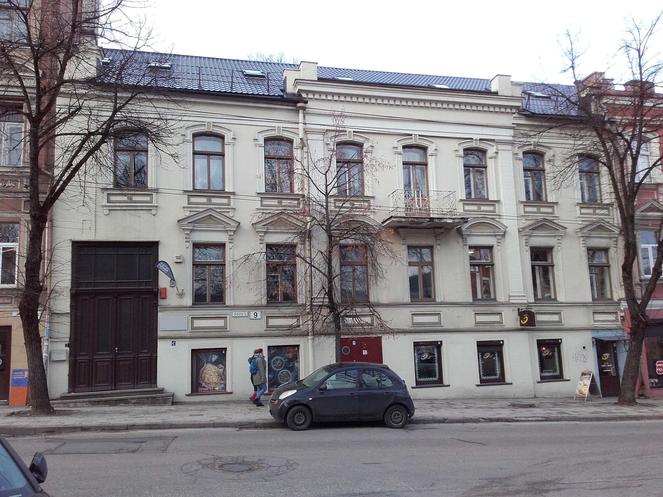 Sodų g. 9